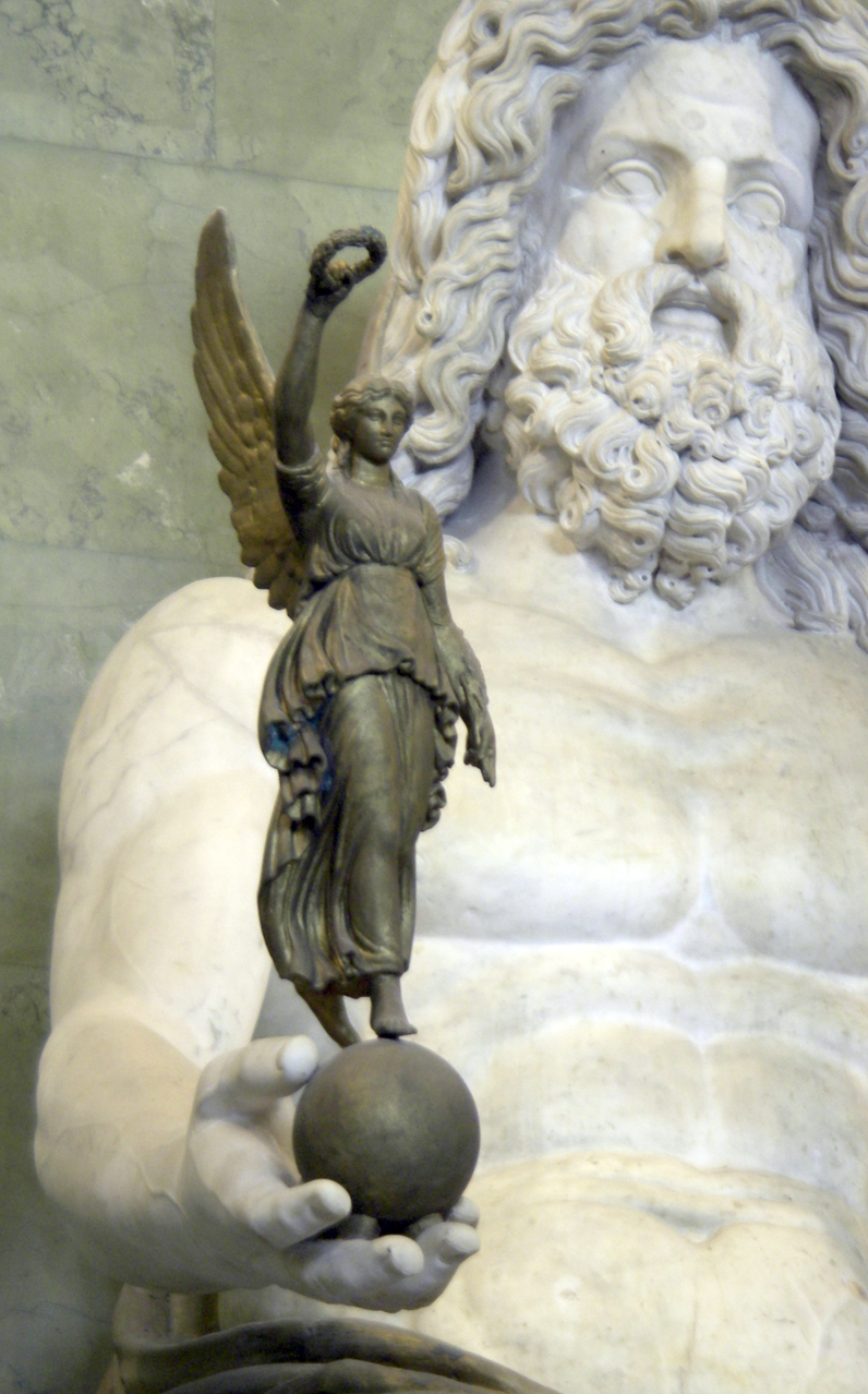 Виктория в руках у Юпитера. Фрагмент статуи Юпитера (см Image:Статуя Юпитера.jpg).